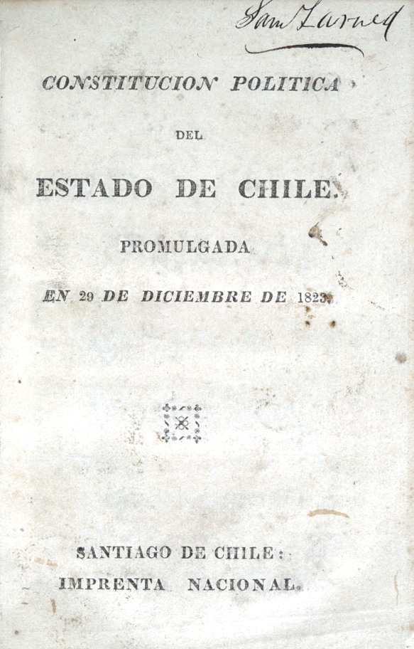 La Constitución Política y Permanente del Estado de Chile de 1823, fue el texto constitucional aprobado por el Congreso Constituyente electo en dicho año, presidido por Juan Egaña. Como primer acto de este Congreso destaca la designación de Ramón Freire como Director Supremo. Además, se creó una comisión para crear la Carta Fundamental. El 27 de diciembre de 1823 fue despachado el proyecto, redactado y propuesto íntegramente por Juan Egaña, y aprobado al día siguiente. Fue promulgada y jurada el 29 de diciembre de 1823. El texto constó de 277 artículos y fue llamada la constitución moralista por sus características normativas que dirigían las actividades de los ciudadanos. Por esta razón y su difícil aplicación en la sociedad de aquella época, fue suspendida en julio de 1824 y declarada insubsistente en diciembre de 1824.